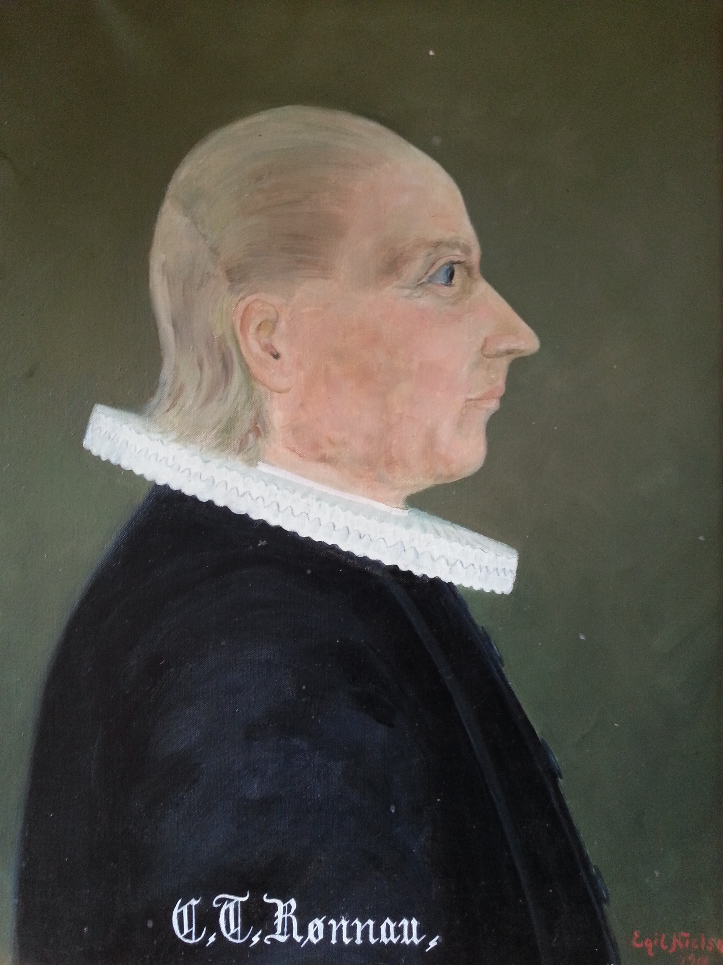 Portrett av Cornelius Thomas Rønnau.